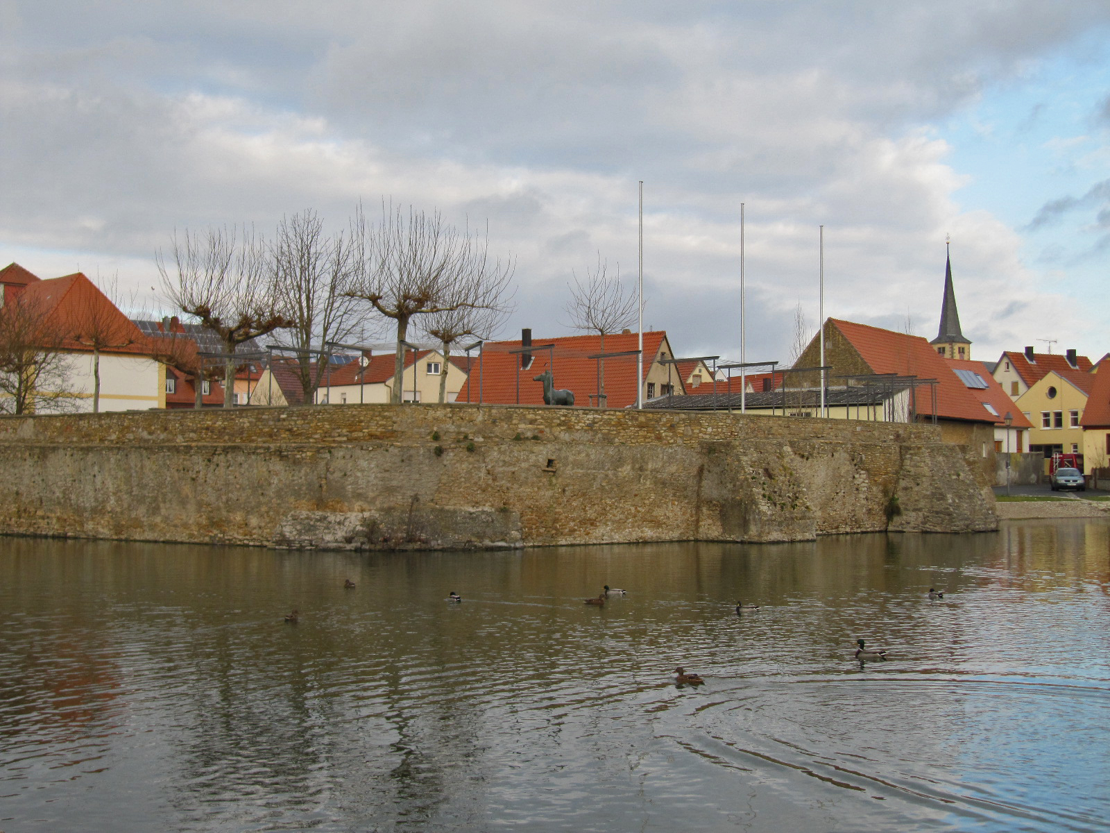 Burg Großlangheim, Reste der Grundmauern und Wassergraben